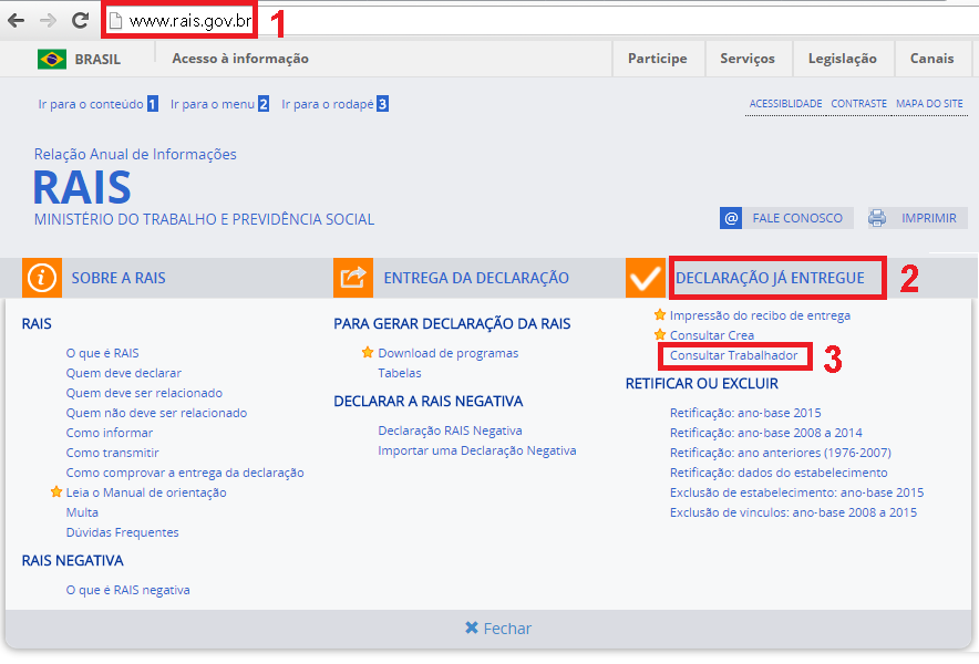 Imagem do sitio do MTE